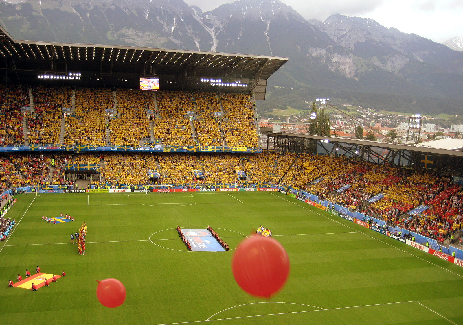 Spain vs Sweden, Euro 2008